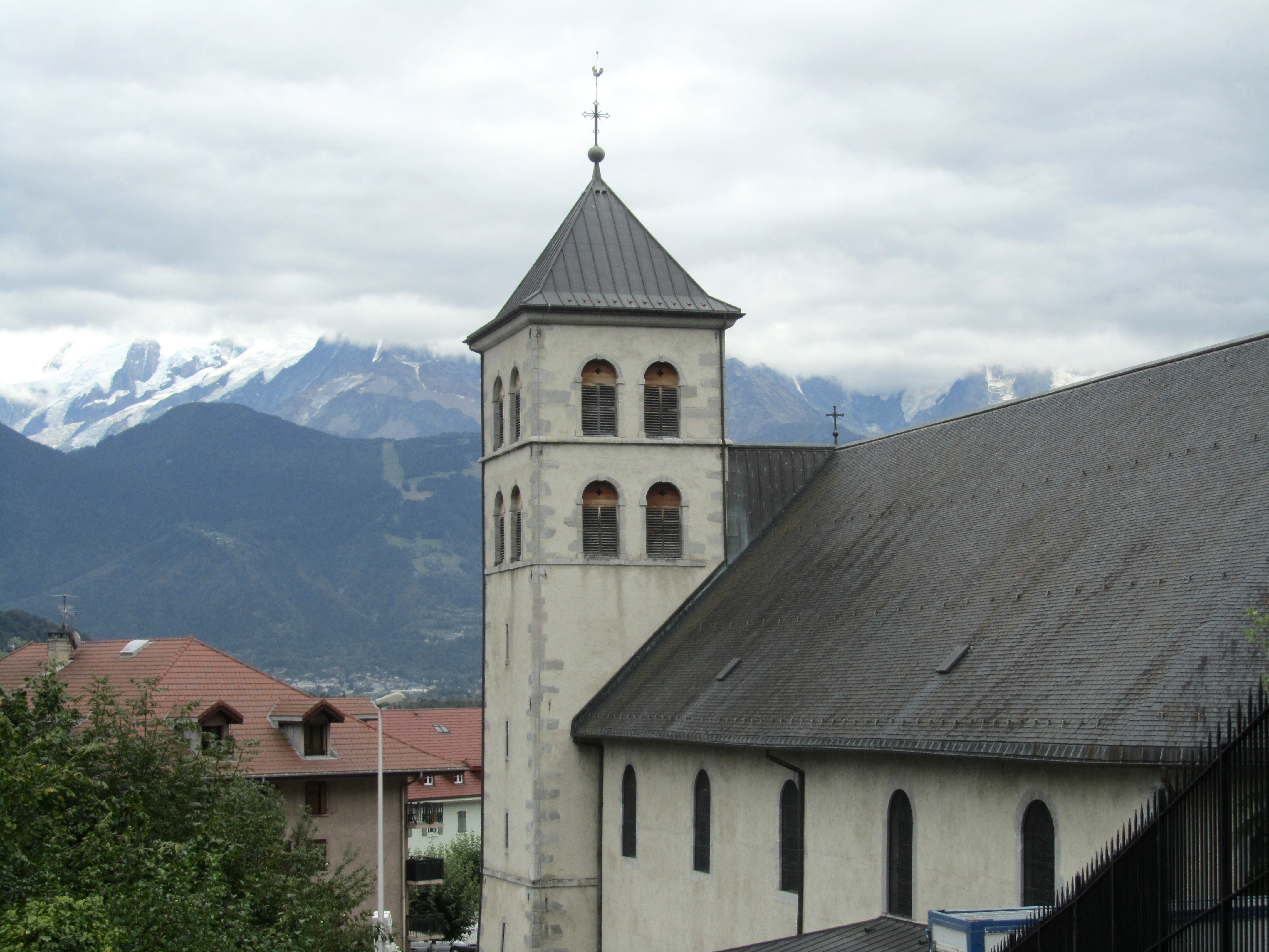 Église de Sallanches (Haute-Savoie)